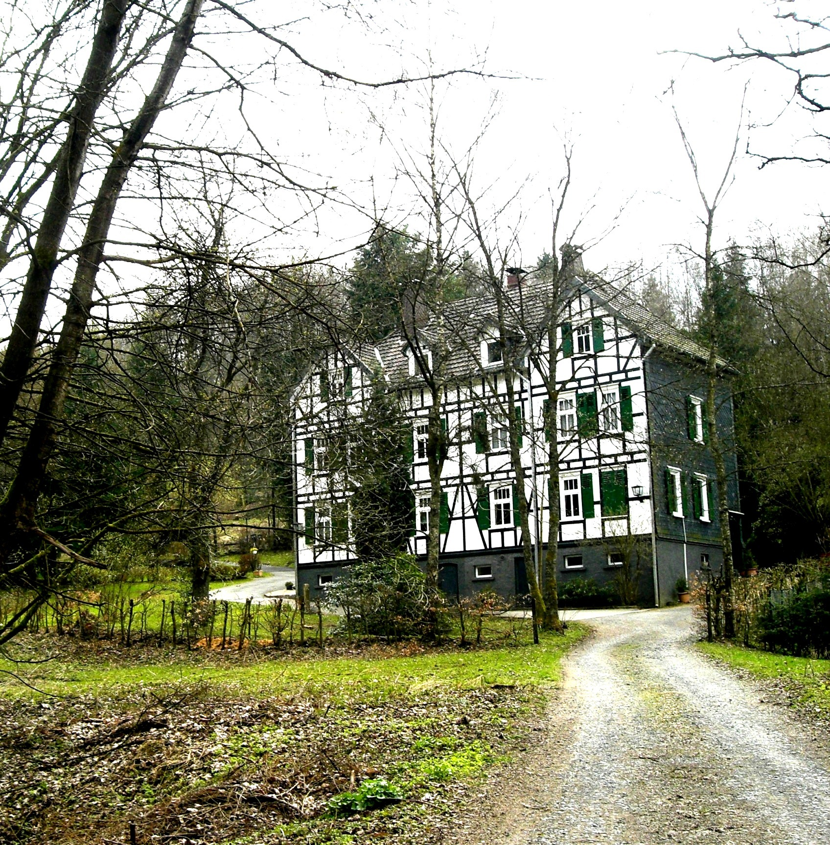 zeigt ein Fachwerkaus im Gelände Ernestus zwischen Halberbracht und Burbecke